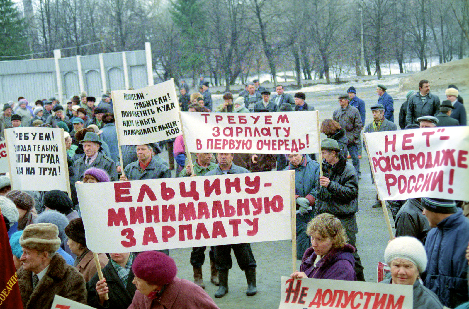 9 апреля 1998 года на Народной площади состоялся митинг трудящихся и безработных города Переславля в рамках Всероссийской акции профсоюзов «За полную выплату заработной платы». Принята резолюция, которая требовала решить социальные вопросы: дать стабильную работу и достойную заработную плату каждому россиянину, погасить долги по заработной плата до 1 июля 1998 года, а остальные задолженности до конца 1998 года, дать законодательную защиту прав и интересов трудящихся, добиться обязательной отставки президента Ельцина. Лозунги на плакатах: «Требуем законодательной защиты труда и права на труд!», «Правители-грабители! Пора ответить, куда идут деньги налогоплательщиков», «Ельцину минимальную зарплату», «Требуем зарплату в первую очередь!», «„Нет“ — распродаже России!», «Не допустим продажу земли!»